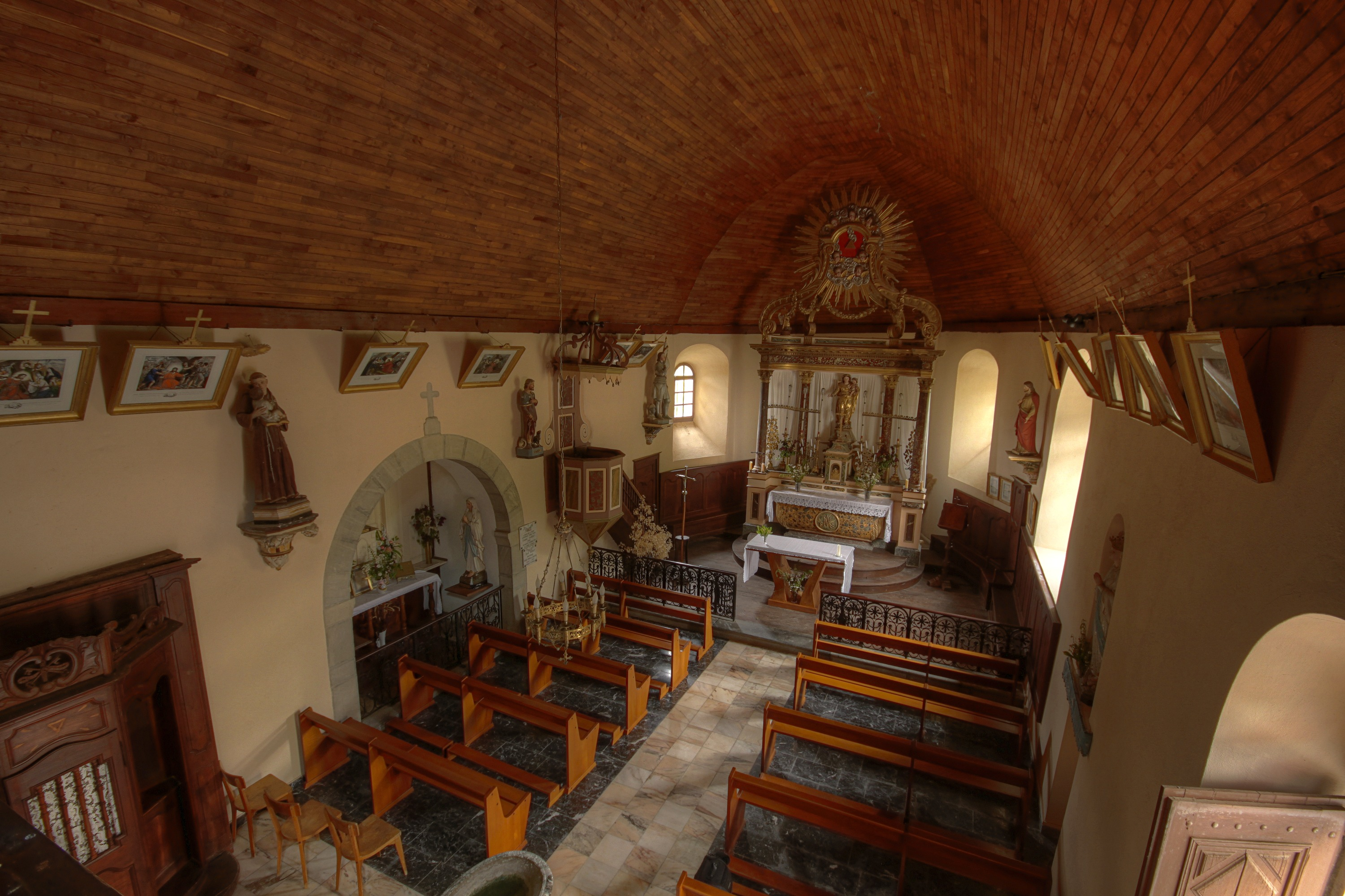 L'nterieur de l'Église de la Nativité de la Sainte Vierge à 65060 Banios dans les Baronnies, Hautes-Pyrénées